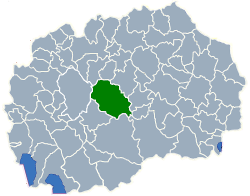 Map of Opština Čaška (Чашка)